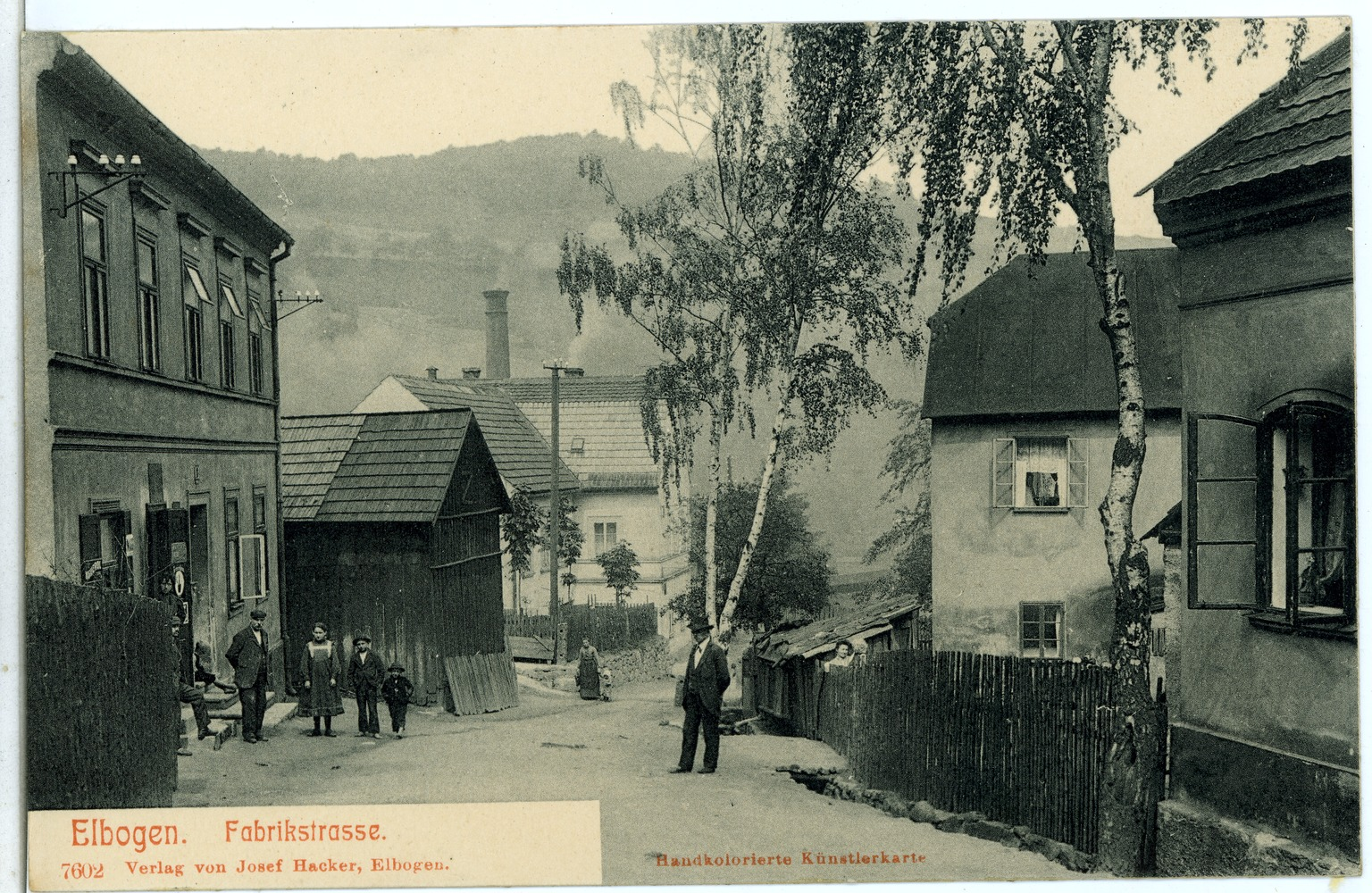 Elbogen; Fabrikstraße This postcard is from publisher Brück & Sohn in Meißen ( postcard has a unique number 07602 and is available in a higher resolution at the publisher. This images was uploaded in a cooperation project between Wikipedians and the publisher.